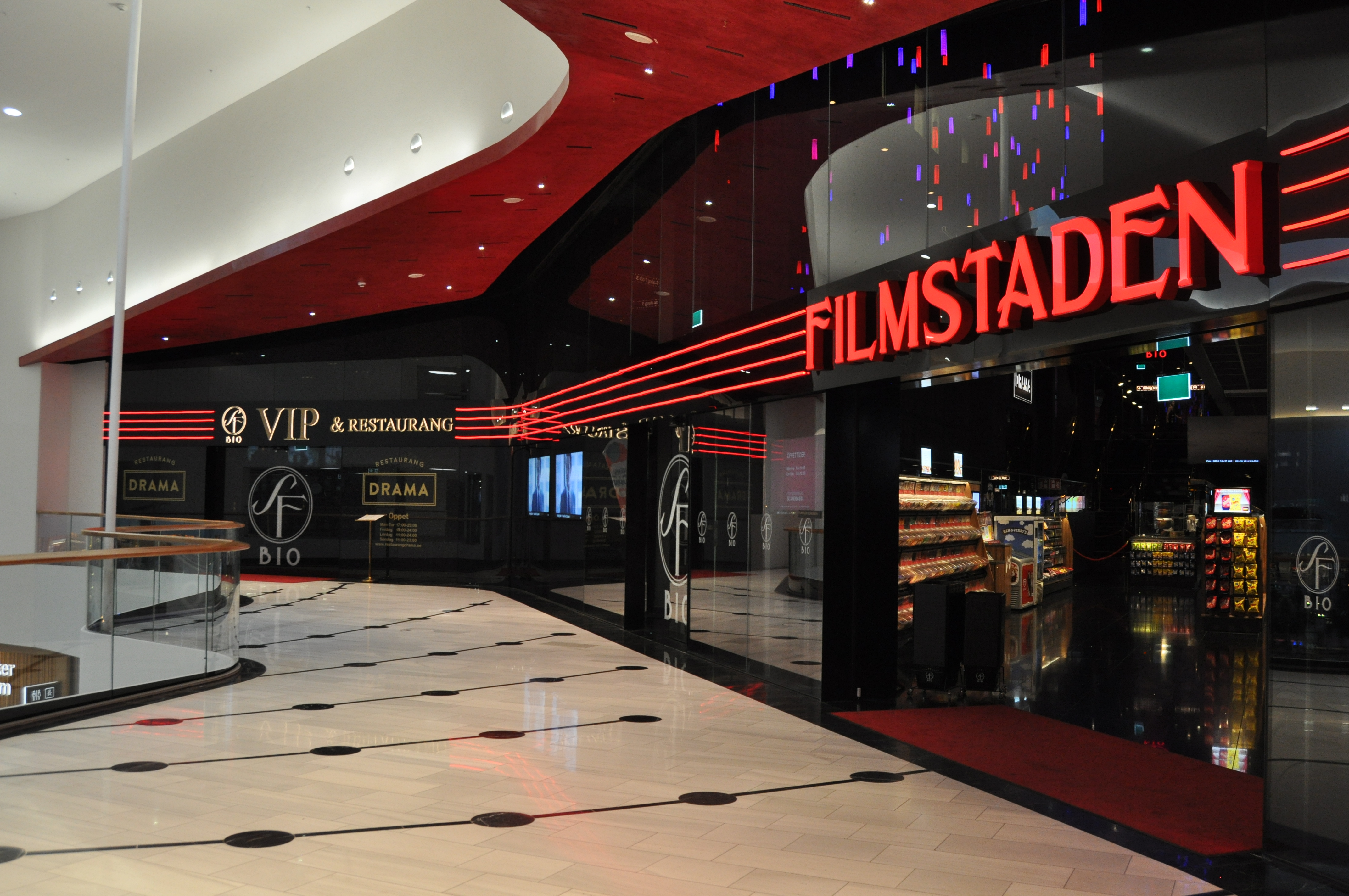 Entrén till Filmstaden Scandinavia